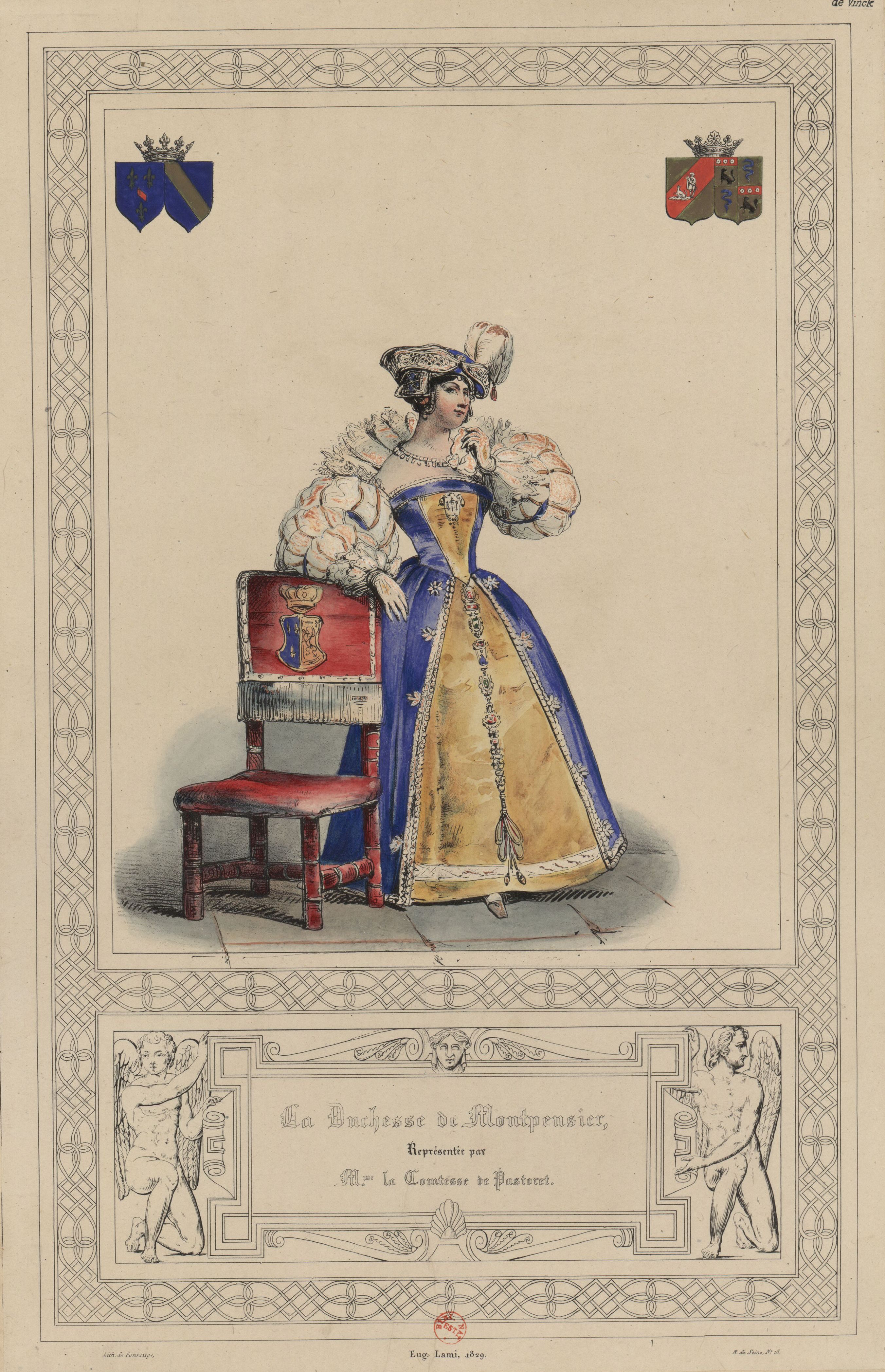 La Duquesa de Montpensier representada por Mme. la Condesa de Pastoret - (Álbum del baile de disfraces dado por S.A.R. Madame, duquesa de Berry el 2 de marzo de 1829 en los apartamentos de los Enfants de France en el Palacio de las Tullerías)